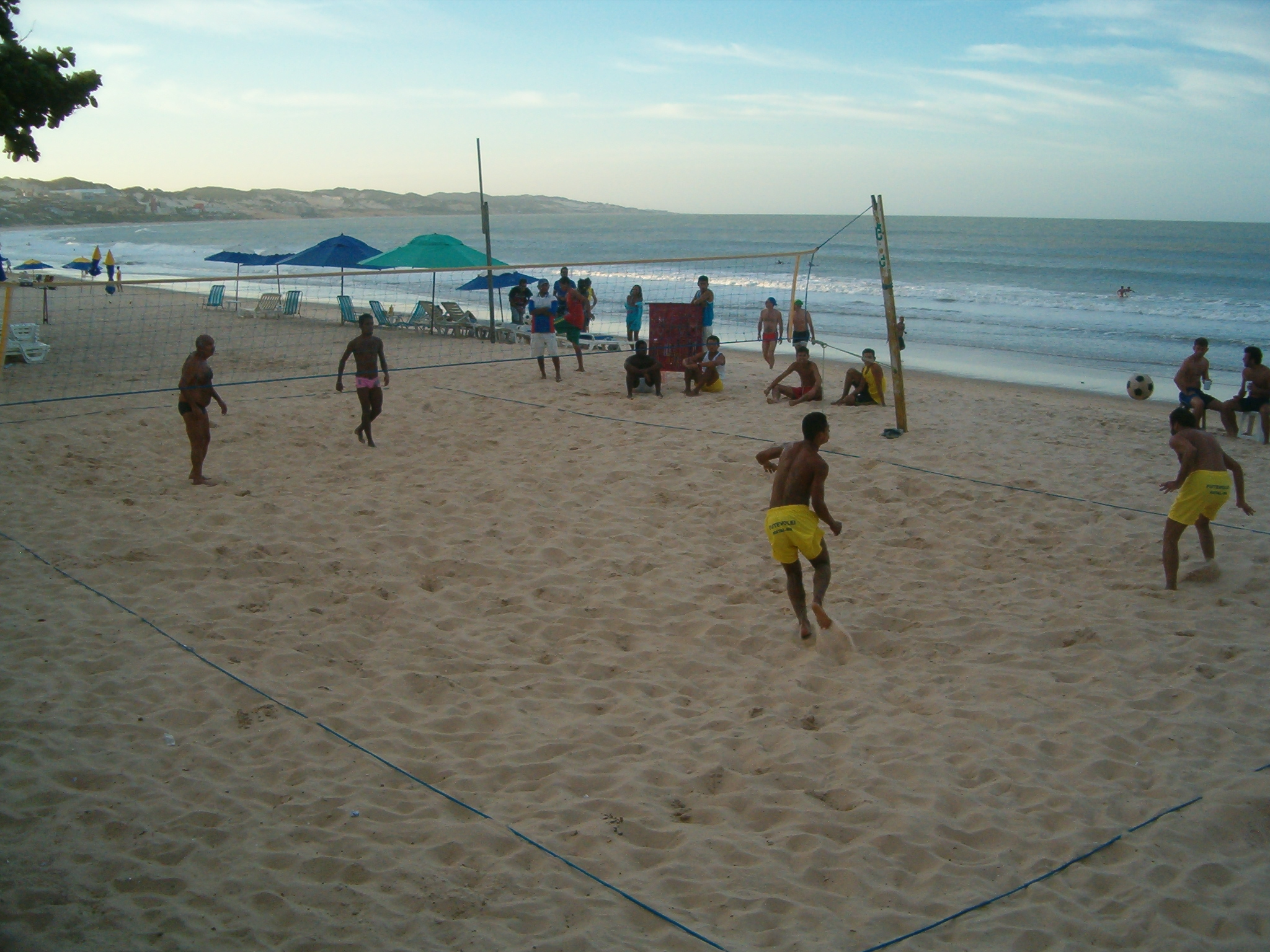 Gente